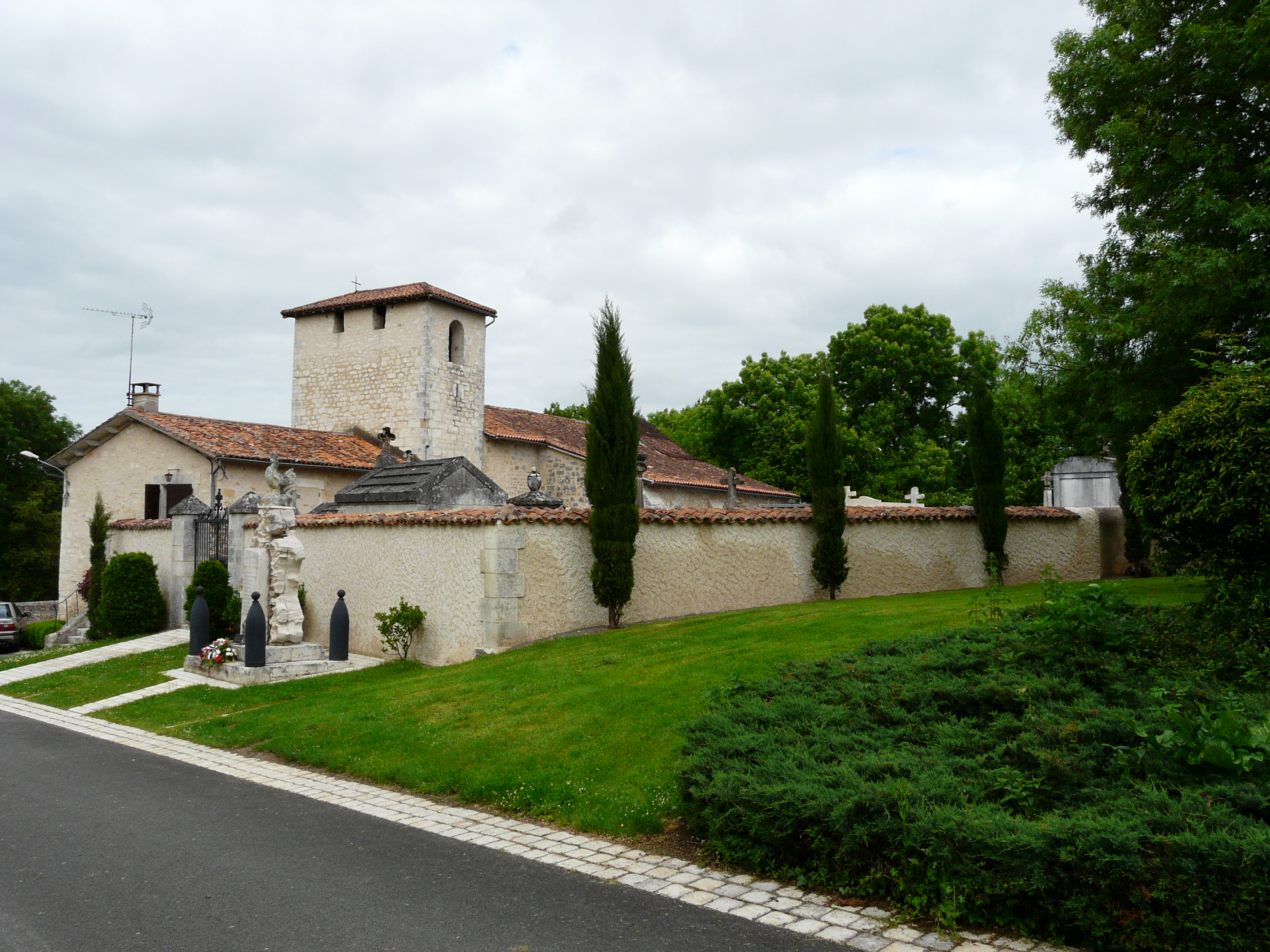 Le monument aux morts, le cimetière et l'église Saint-Antoine, Souffrignac, Charente, France